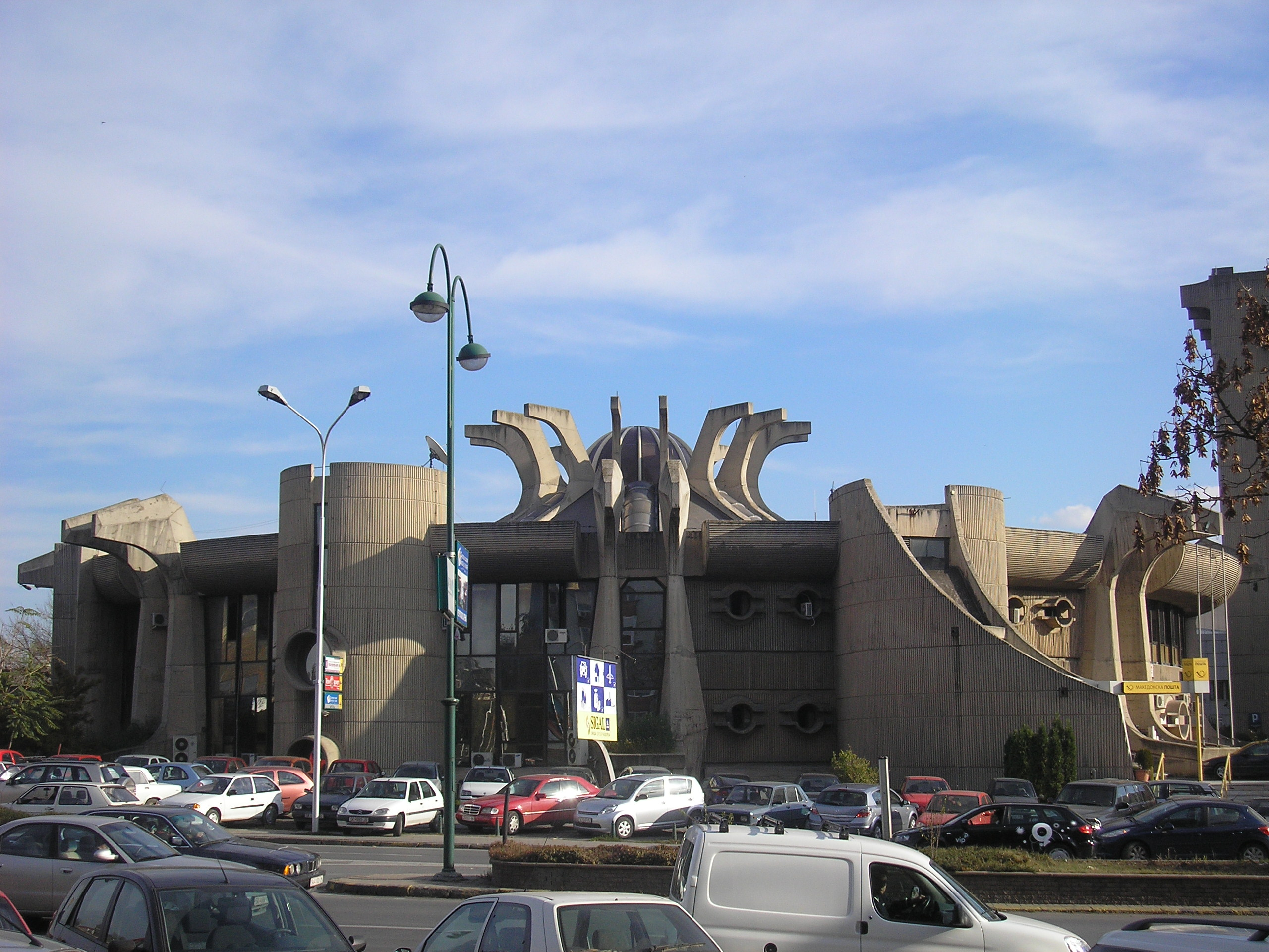 Hauptpost in Skopje